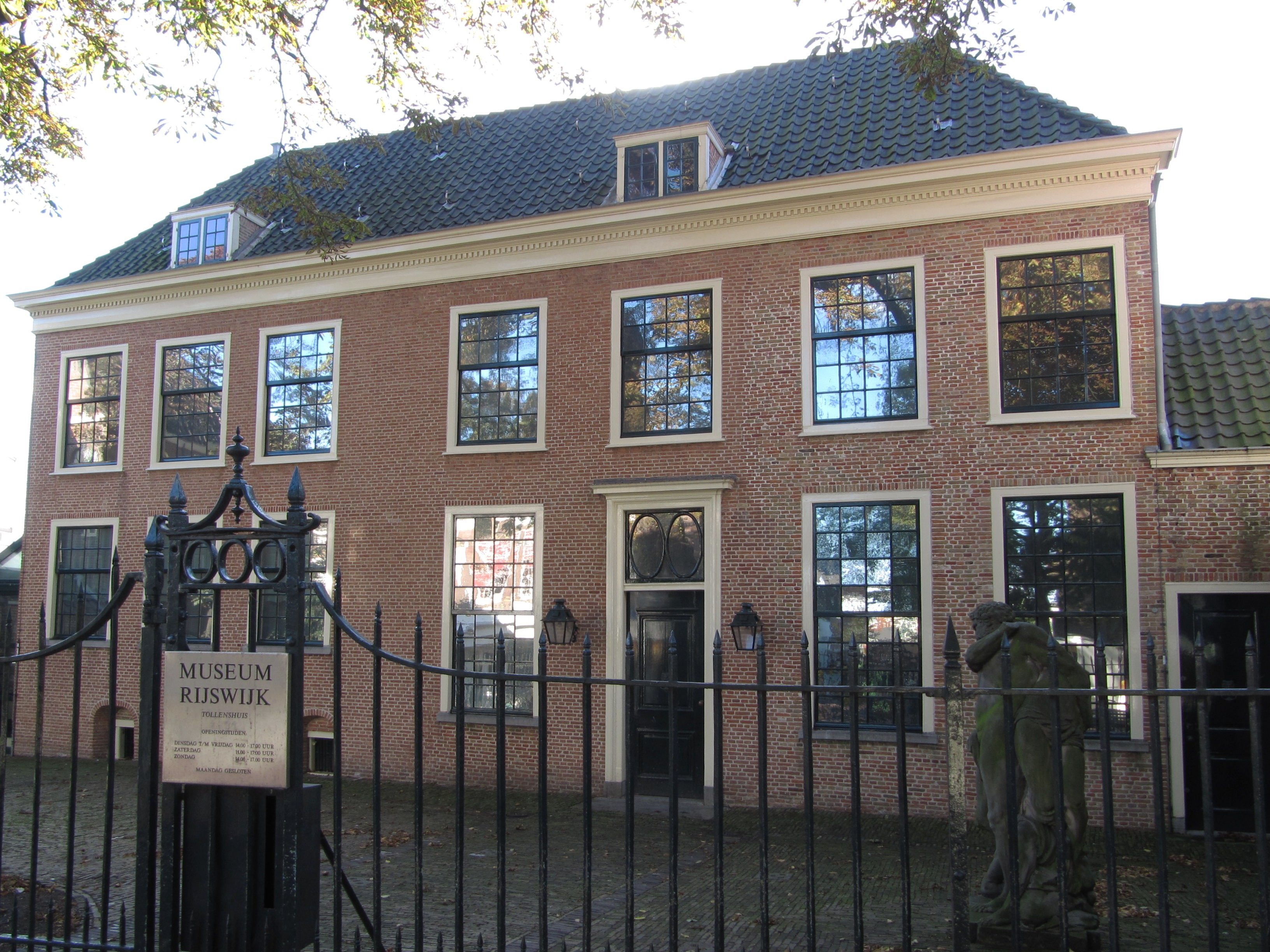 RM20048 Rijswijk - Herenstraat 67.jpg